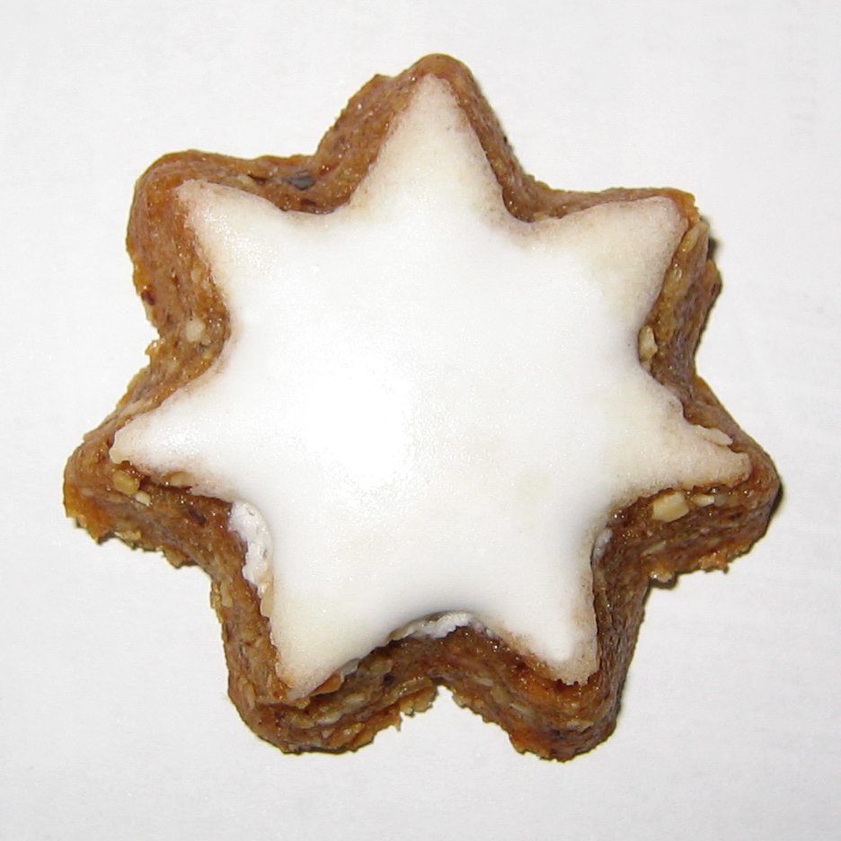 Ein Zimtstern